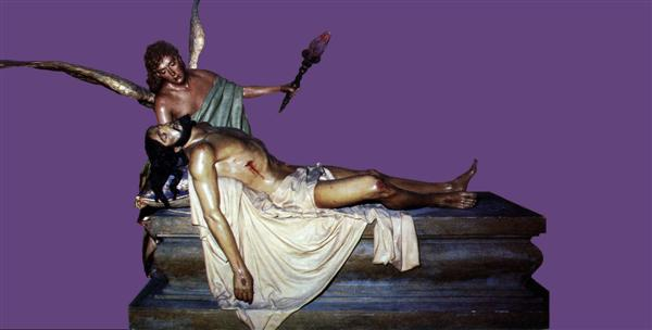 Señor de la Buena Muerte con el Ángel de la Fortaleza, popularmente conocido como "Santo Sepulcro". Obra del imaginero José Ortiz, venerada en Beniaján (Murcia) - España.